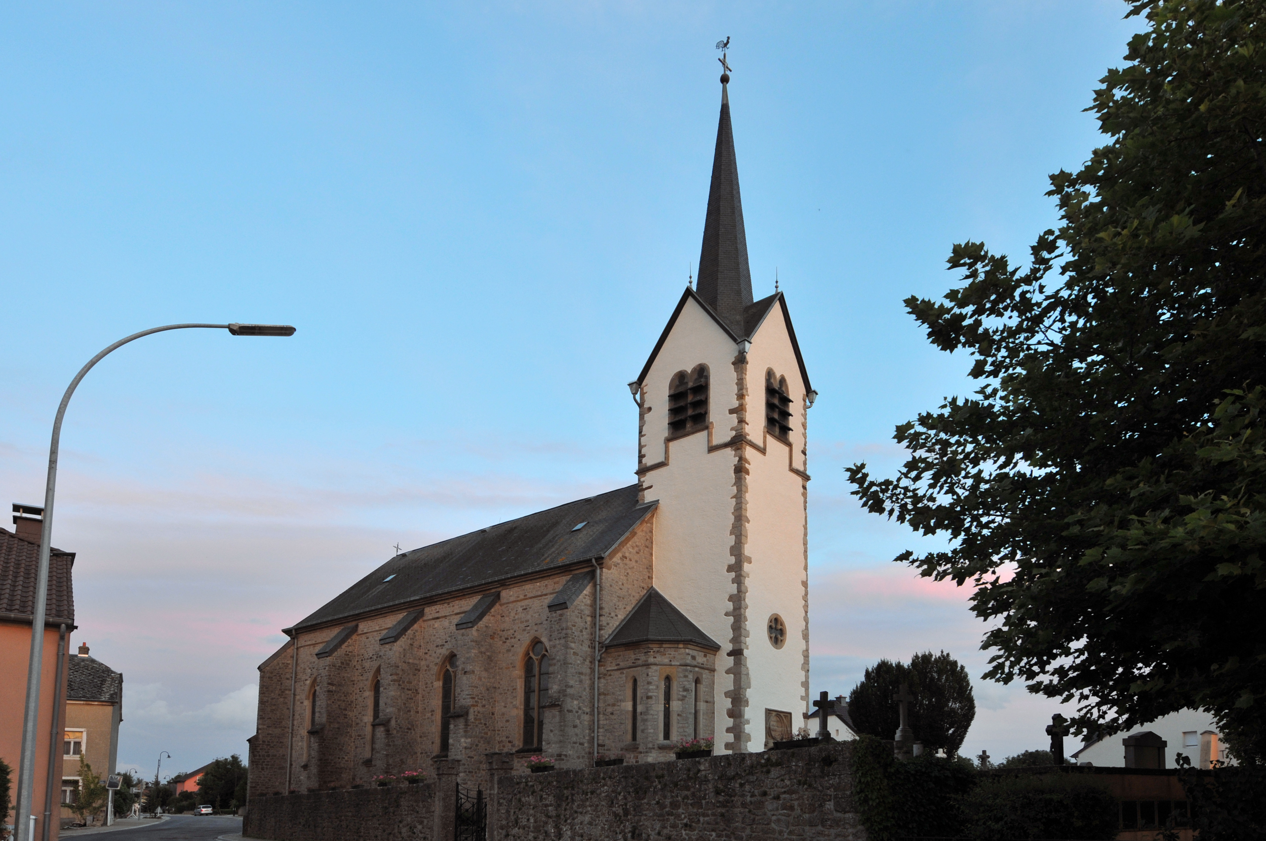 D'Kierch zu Elveng.